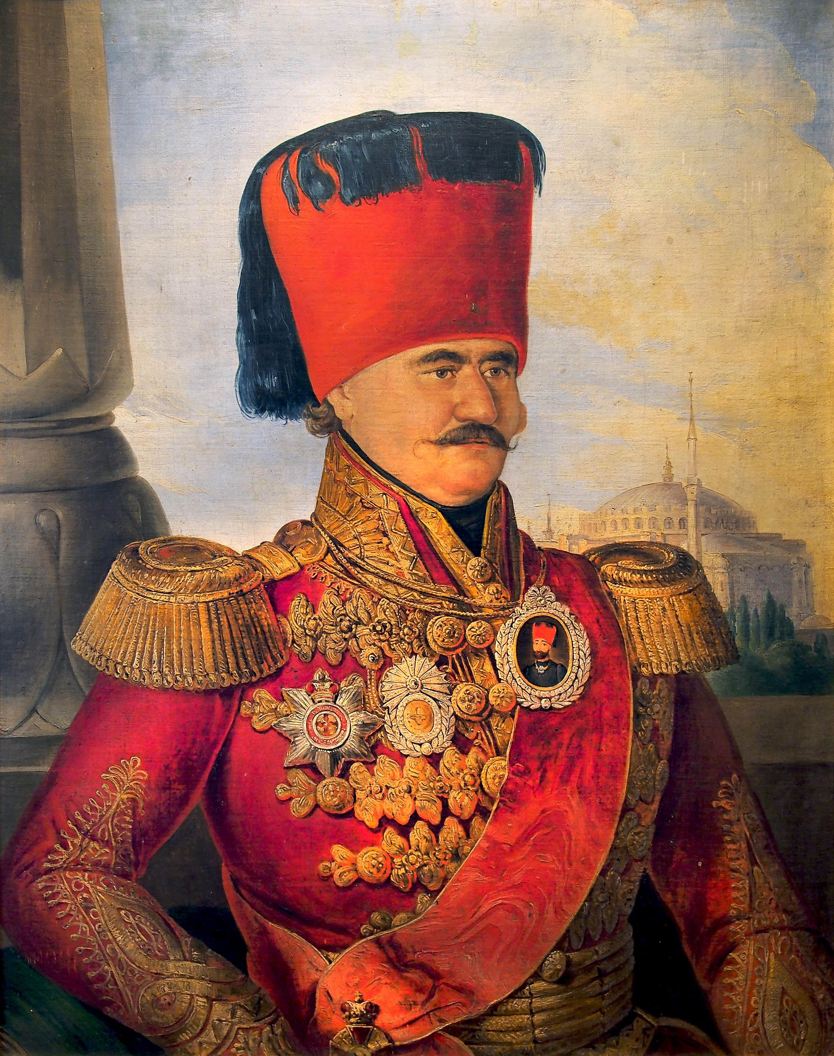 Miloš Obrenović I, Prince of Serbia